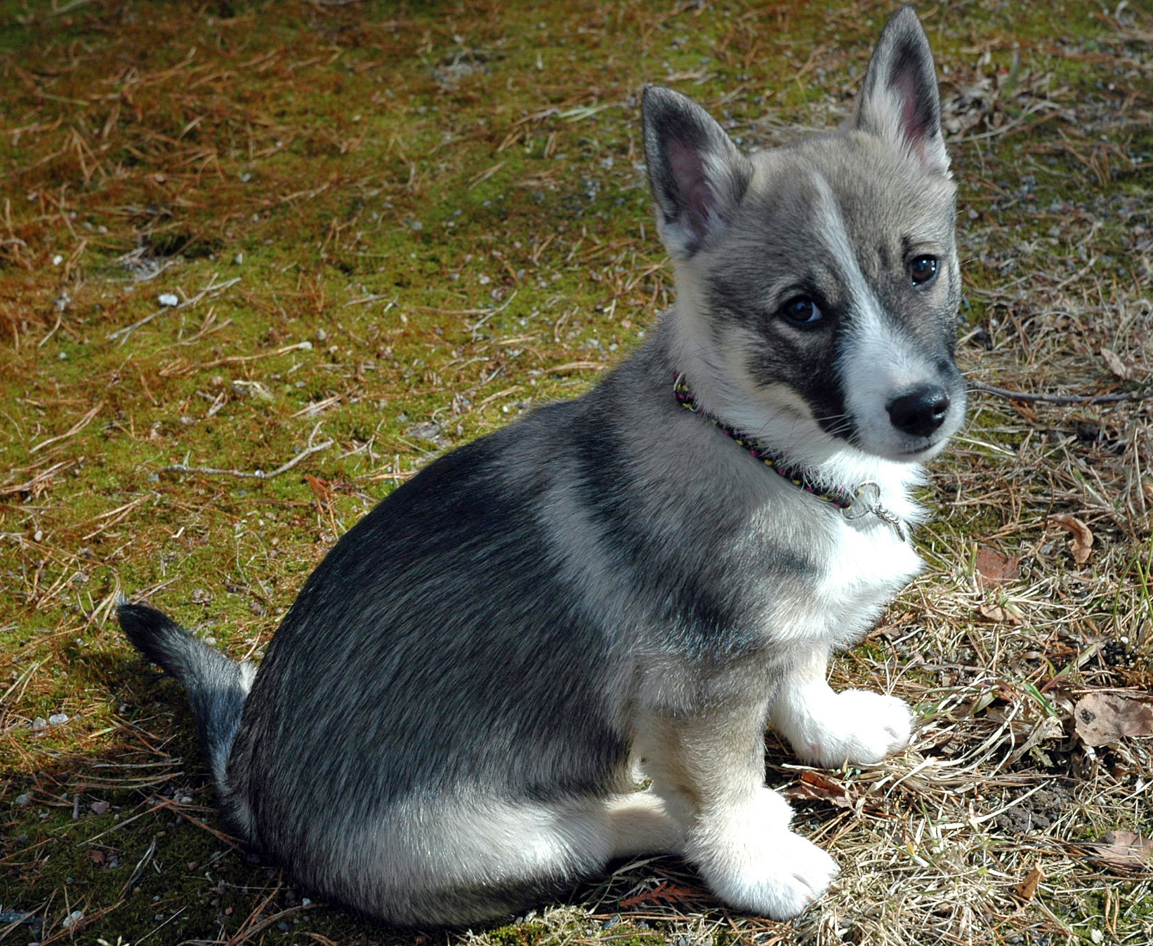 Västgötaspets 3 månader